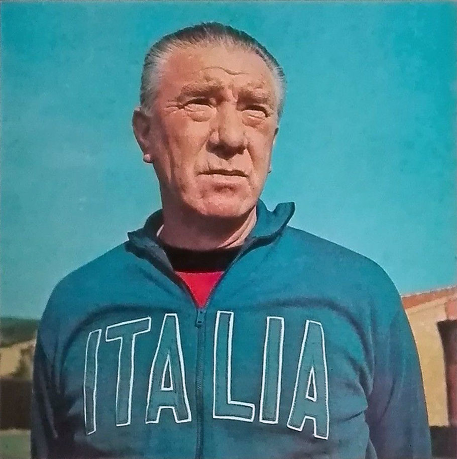 Ferruccio Valcareggi, commissario tecnico della nazionale italiana di calcio (1968-1974), nel 1973.